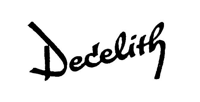 Logo des PVC-Kunststoffes Decelith der Deutschen Celluloid-Fabrik AG, später VEB Eilenburger Celluloid-Werk und VEB Eilenburger Chemie-Werk, Schutzenddatum: 10. November 1998